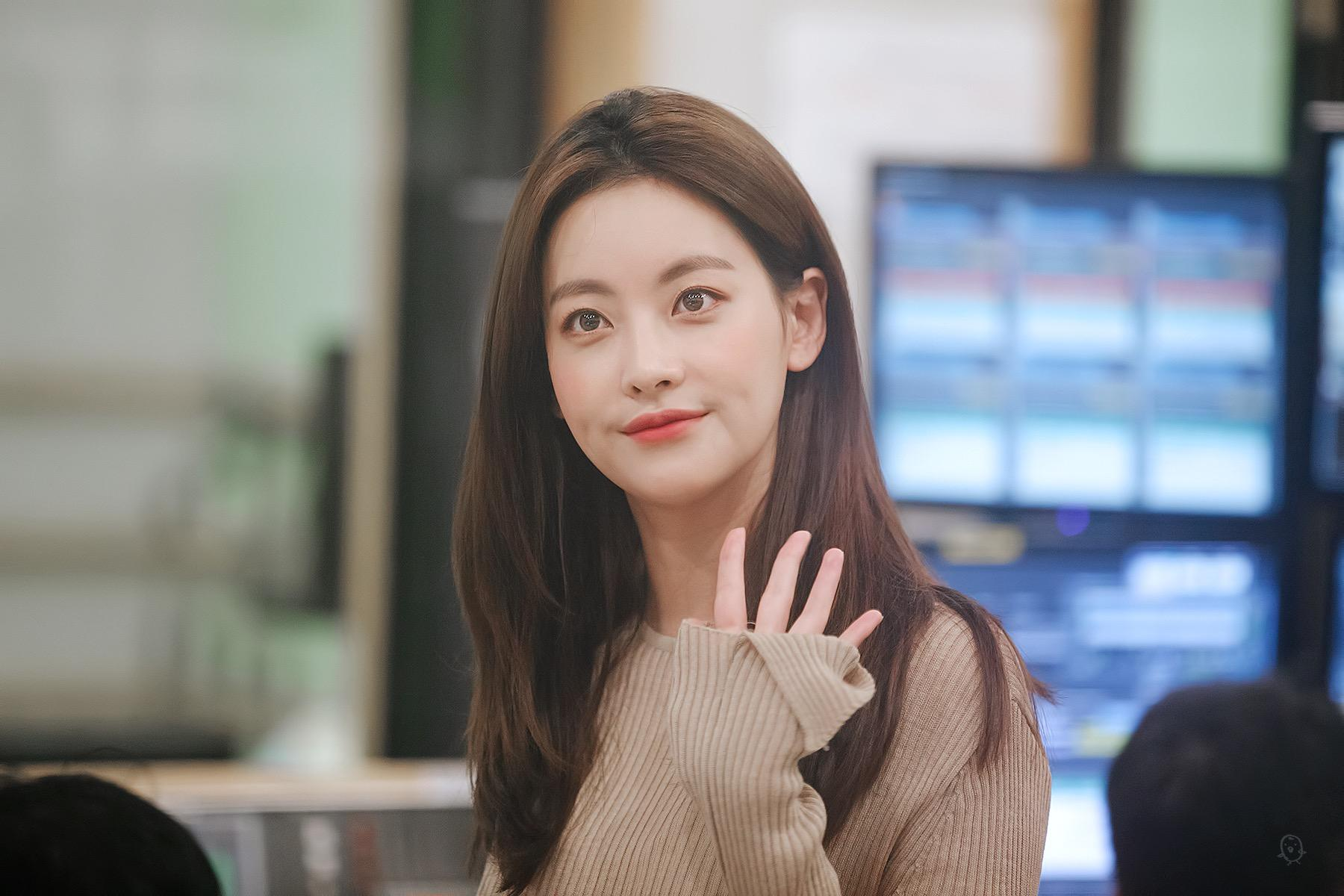 170821 김예원의 볼륨을 높여요 게스트